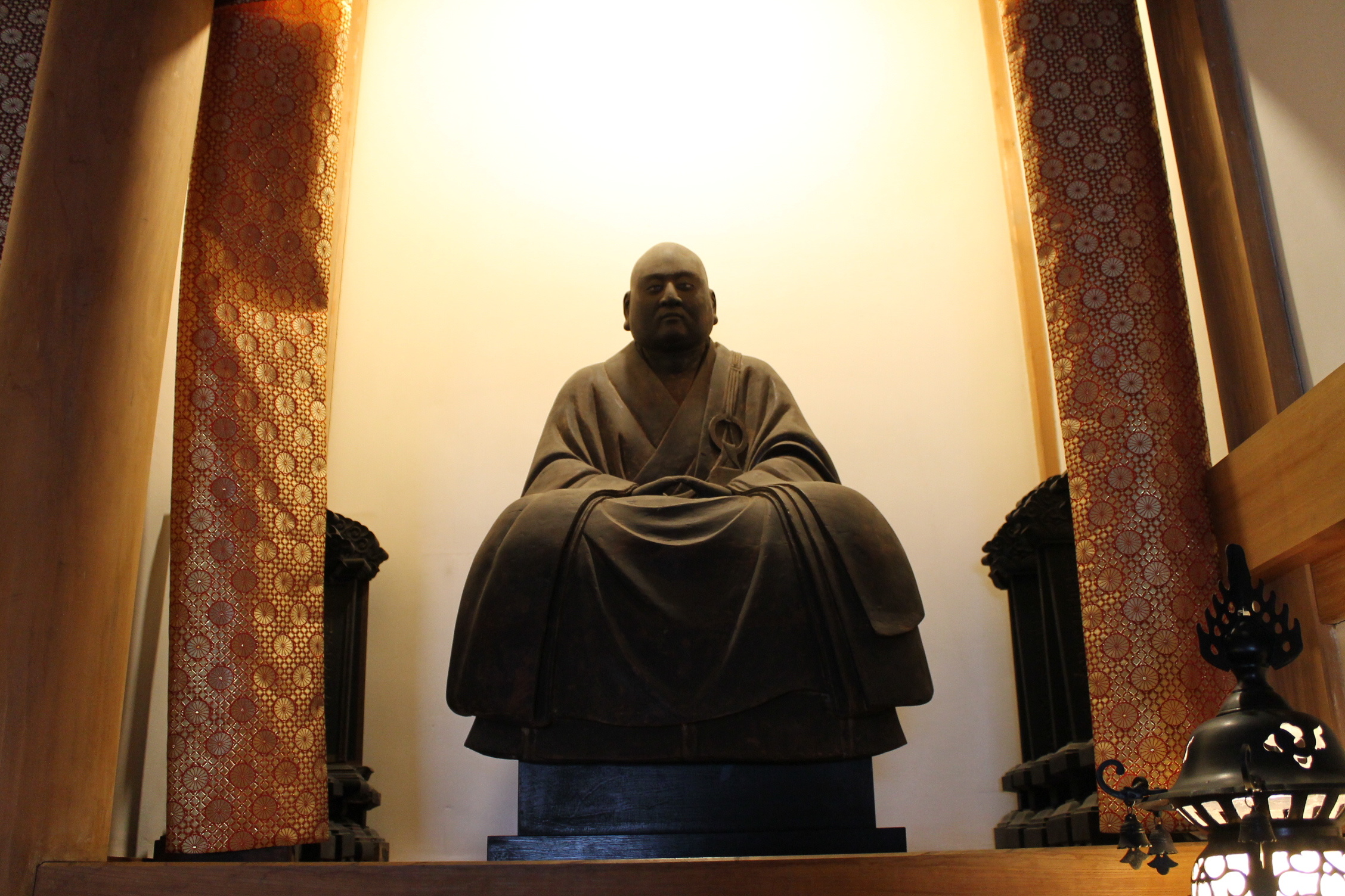 方外宏遠の坐像 海藏院開山